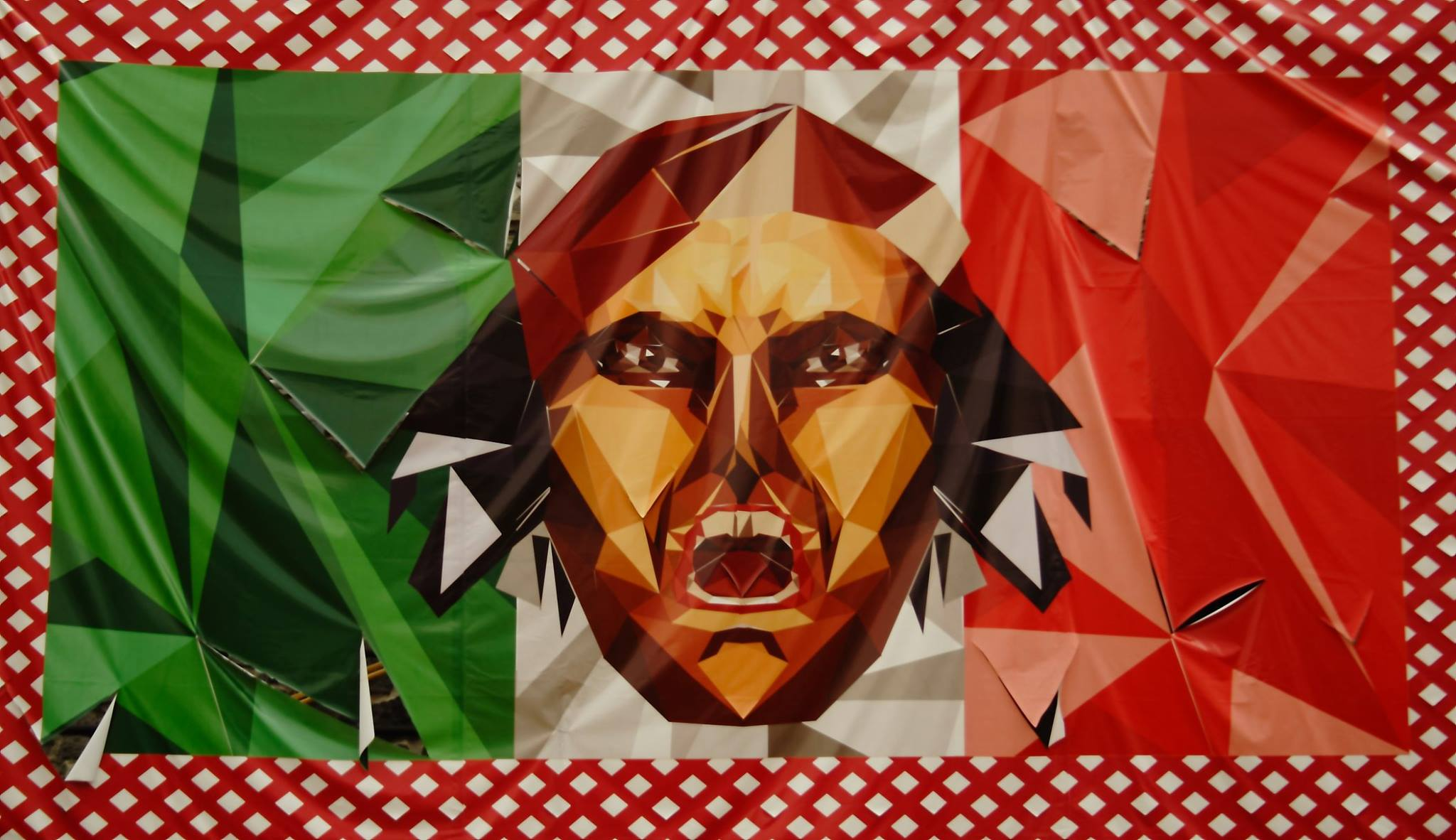 Fotografía de pancarte de Morelos durante la celebración del día de muertos en Ciudad Universitaria, México.